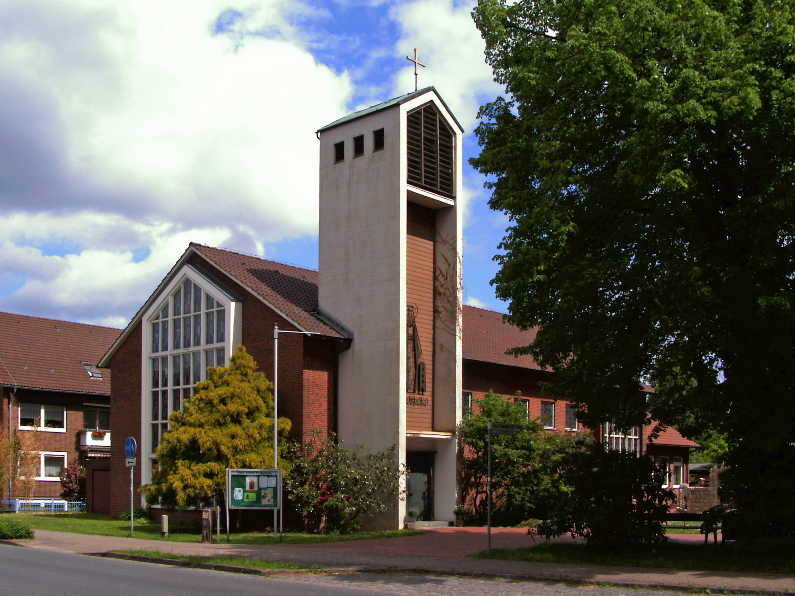 Katholische Kirche St. Barbara in Wathlingen, Landkreis Celle.